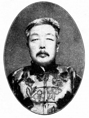 中文（台灣）: 中華民國國會議員